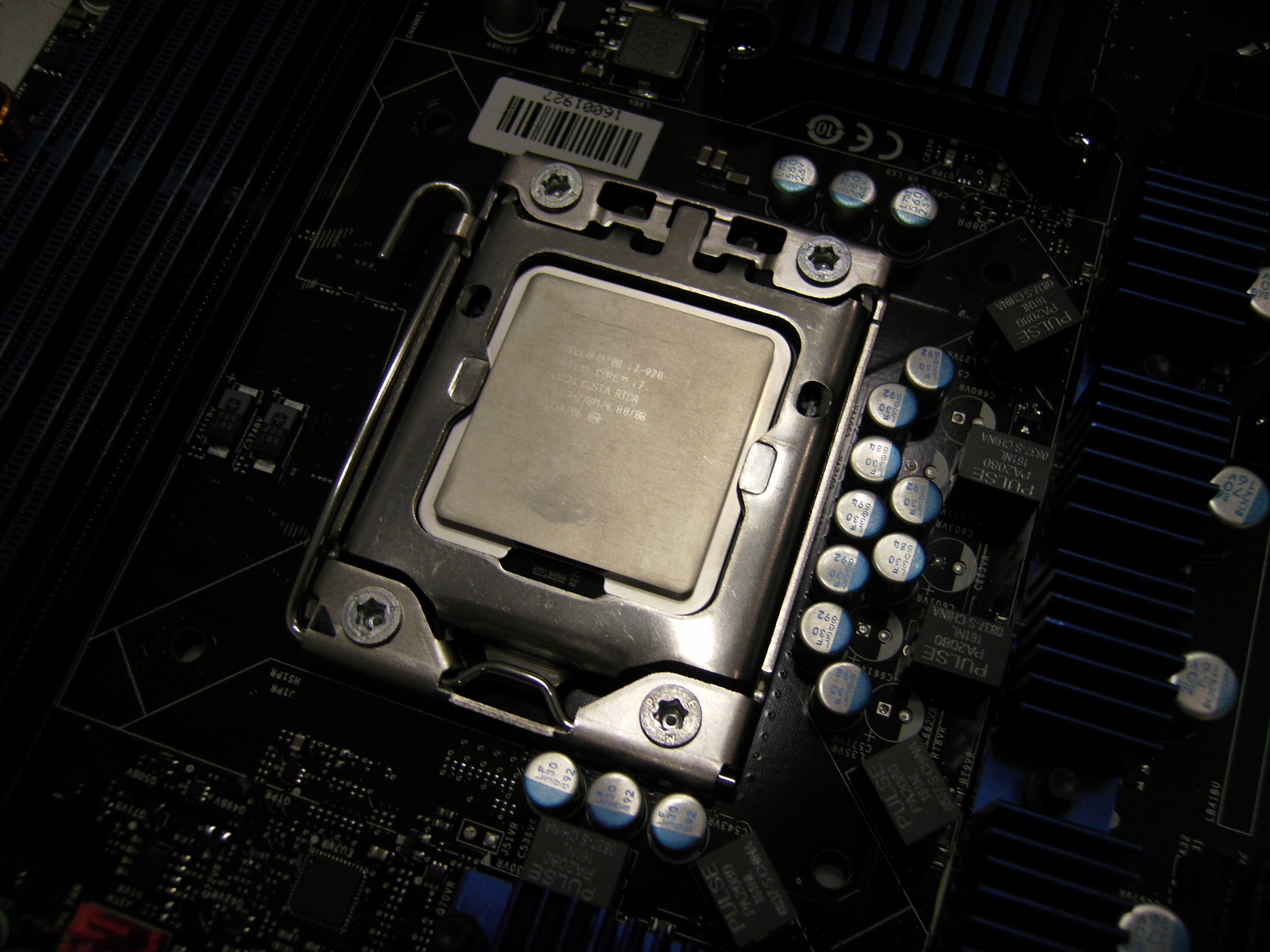 Microprocesador Intel Core i7-920